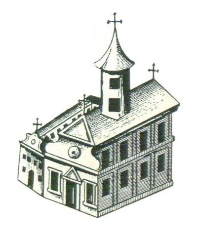 Беларуская (тарашкевіца): Менск (Miensk), вуліца Вялікая Бэрнардынская (vulica Vialikaja Bernardynskaja). Касьцёл Сьвятога Язэпа і кляштар бэрнардынаў